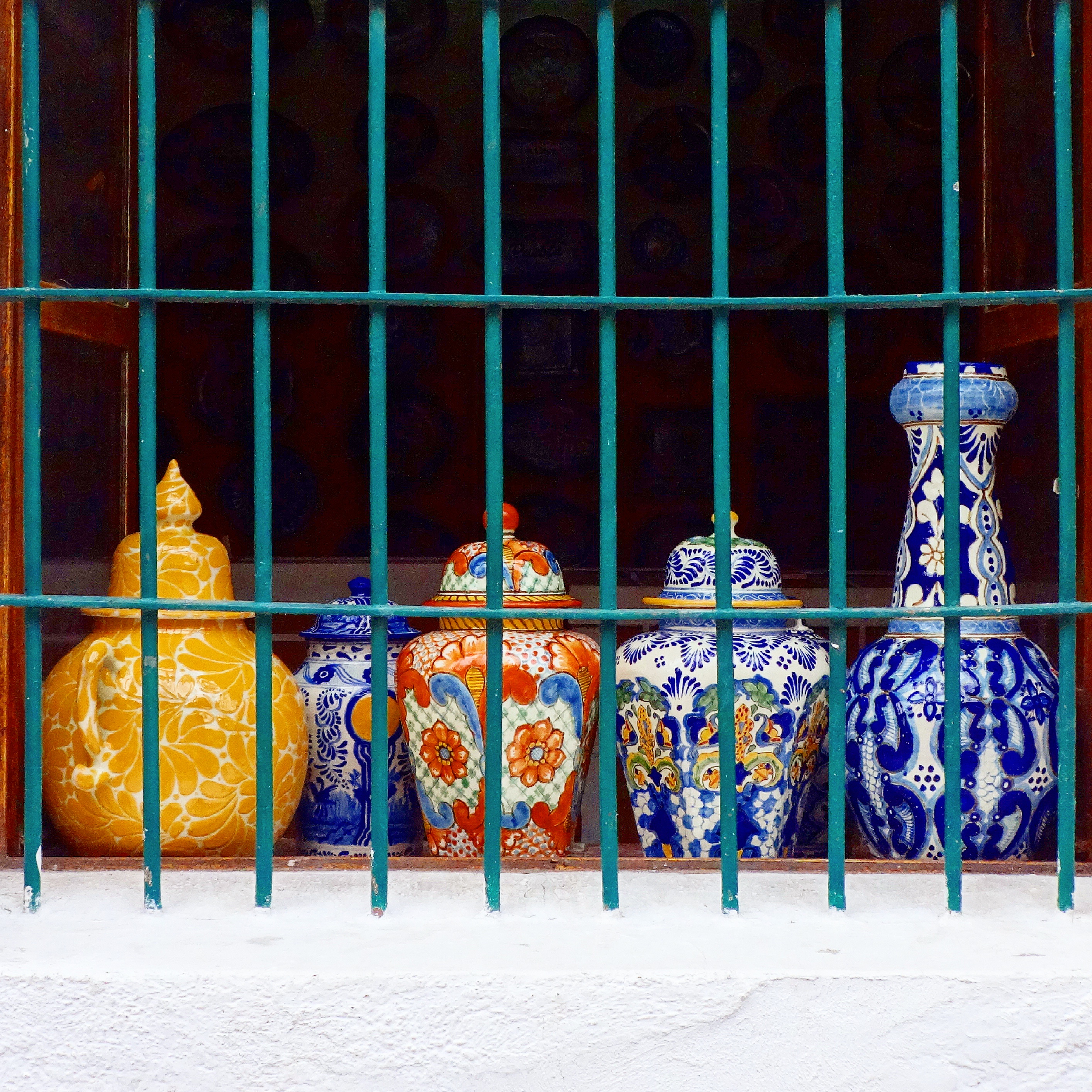 Tibores de talavera adornando una ventana del "Taller Armando".